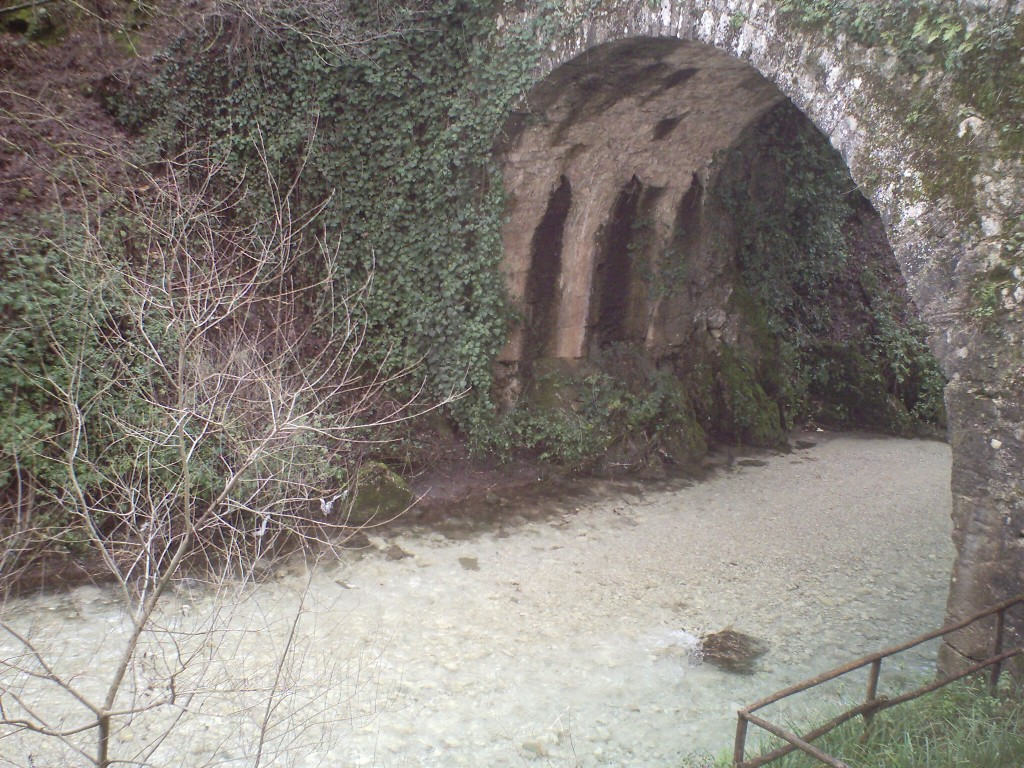 Acque che scorrono sotto il ponte romano (ponte della lavandara) in Montella, AV, Italia.